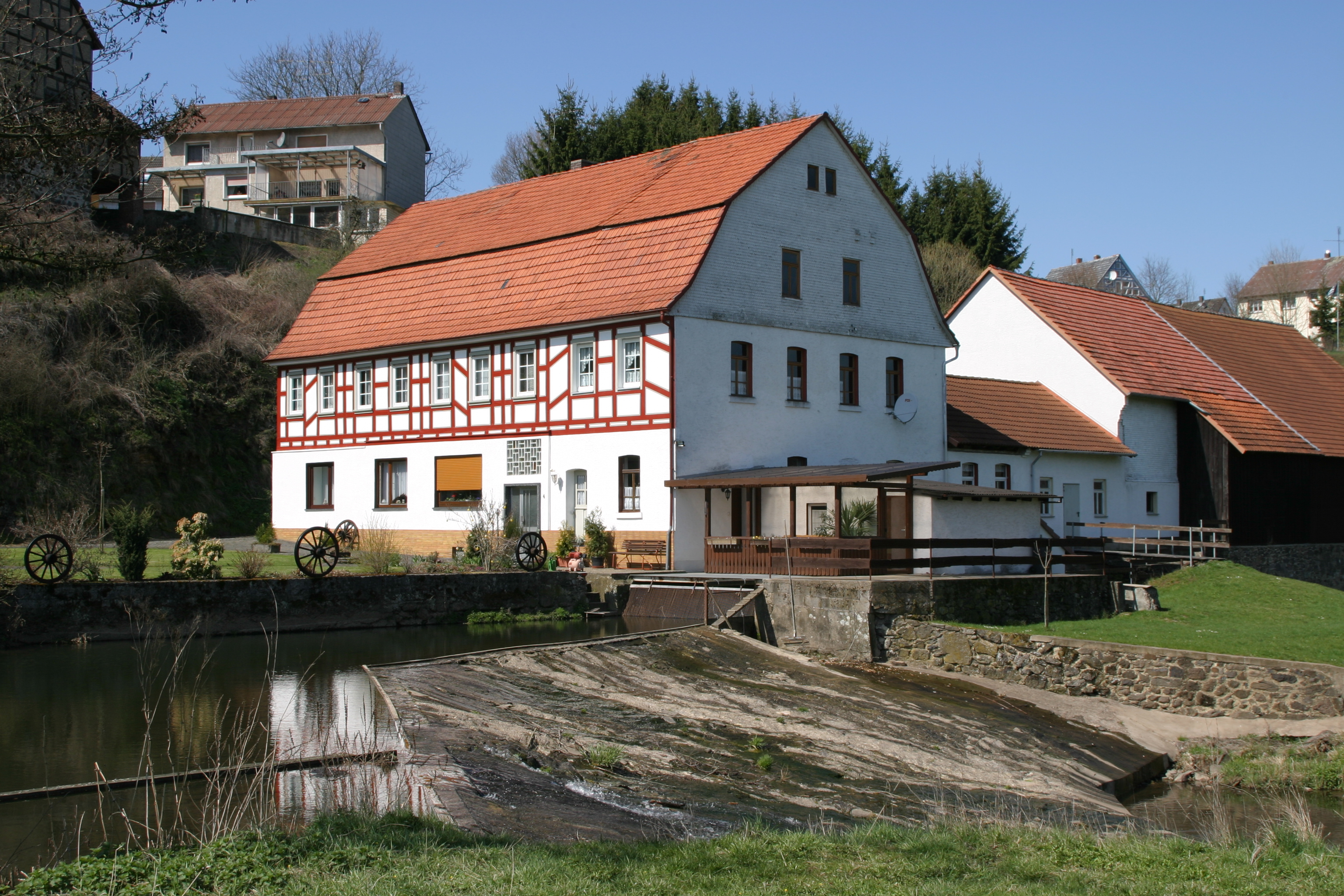 Gemünden Burg-Gemünden Schwabes Mühle 12.04.2004